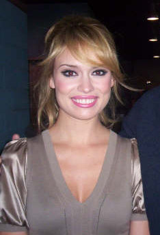 Patricia Conde en los platós de Globomedia, donde se emitía el programa 'Sé lo que hicisteis...'